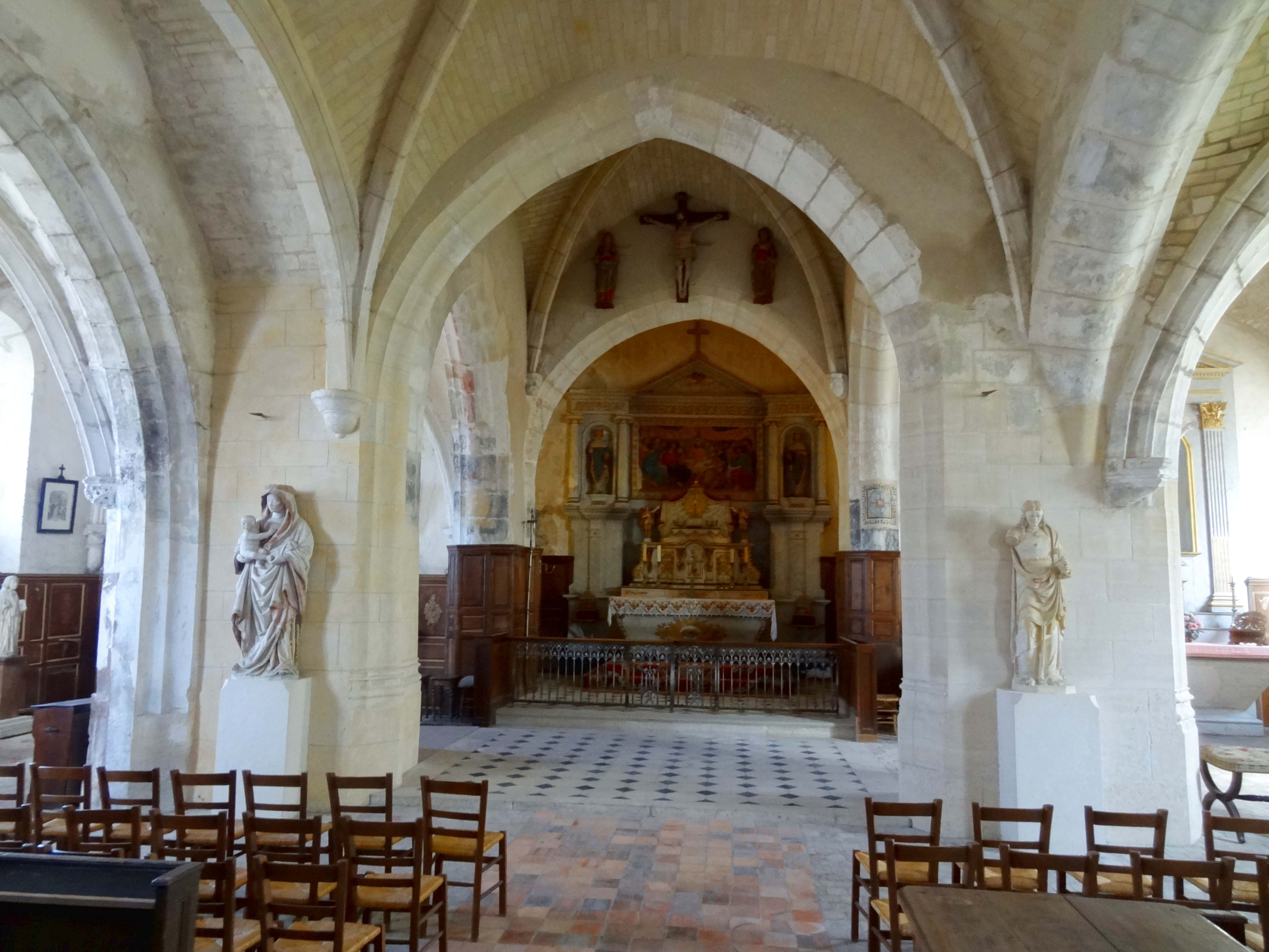 Intérieur de l'église - voir titre.